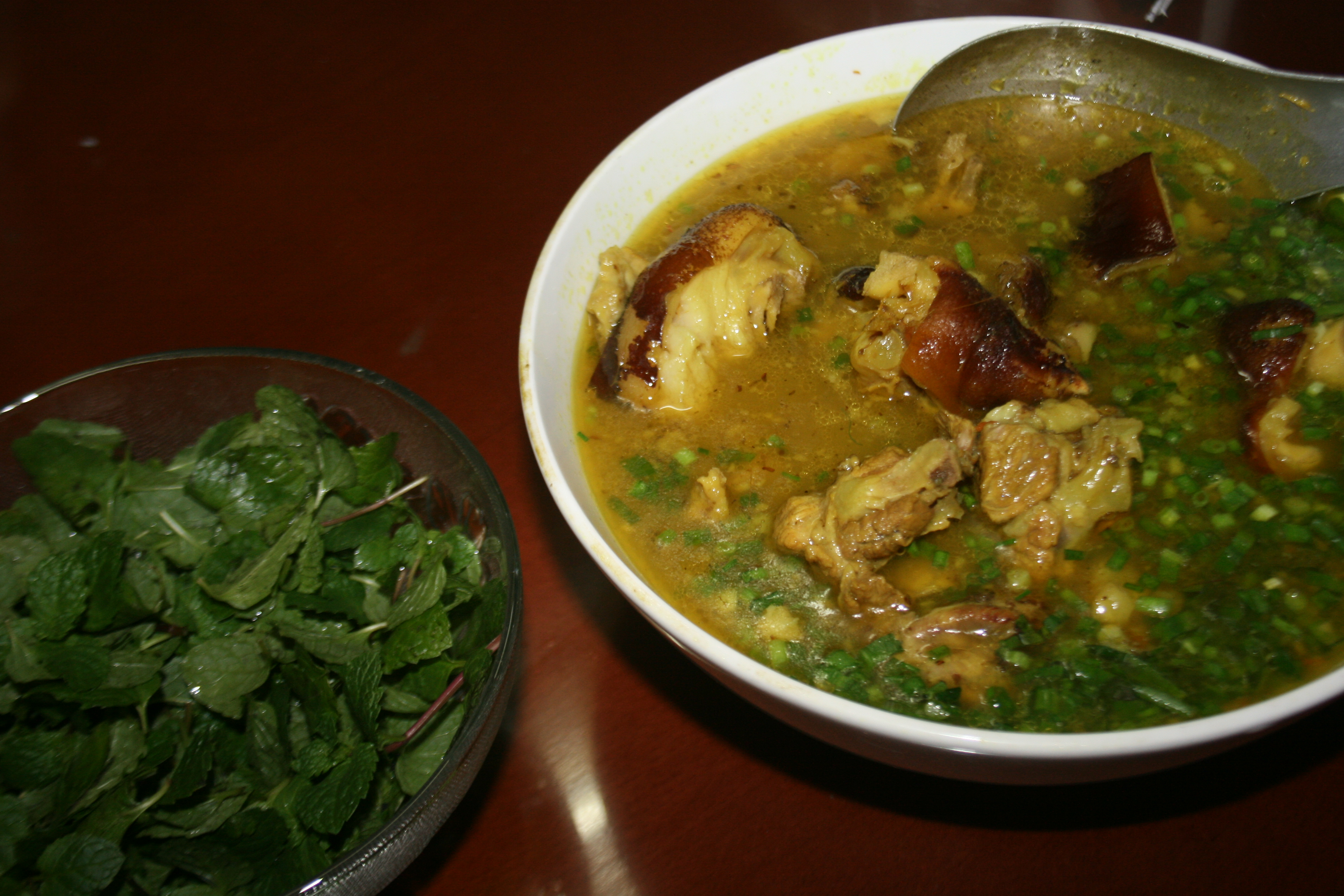 Chân giò nấu giả cầy dạng loãng, nhiều nước để tiện chan với bún, ăn kèm với rau húng lũi